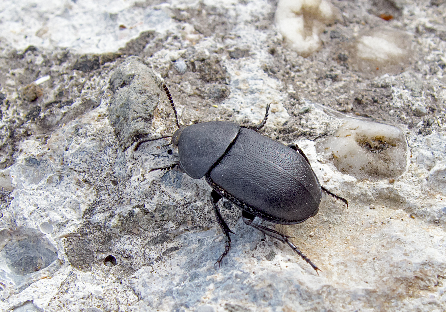 This species is a genus of burying beetles, present in most of Europe and in the Near East, it is a predator of live terrestrial slugs and snails. It is able to penetrate the snail shells. Found at the pier of Kiten, Bulgaria. Большинство видов семейства Мертвоеды (лат. Silphidae) — хищники или питаются падалью. Жук поедает не только падаль, но и живых слизней и улиток. Распространение - почти все страны Европы и Ближний Восток. Найден на пирсе города Китен, Болгария